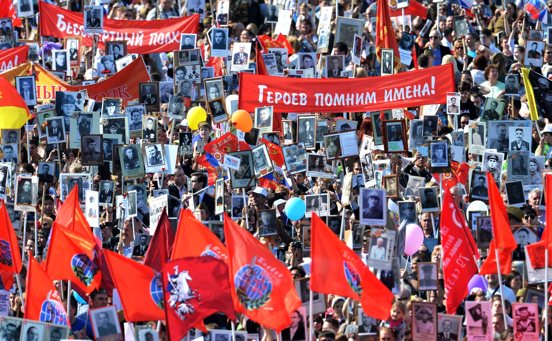 Шествие региональной патриотической общественной организации «Бессмертный полк» В День Победы Владимир Путин принял участие в акции «Бессмертный полк». Глава государства с портретом своего отца-фронтовика присоединился к шествию колонны на Красной площади.